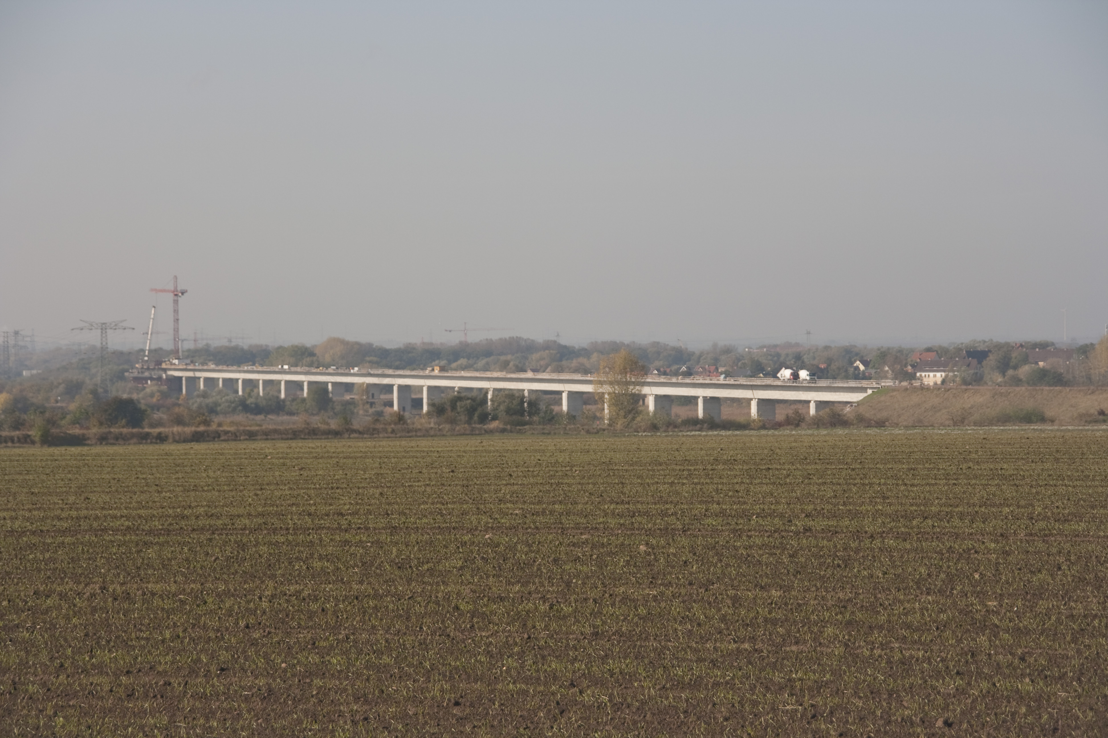 Saale-Elster-Talbrücke vom Widerlager Ost in Richtung Westen